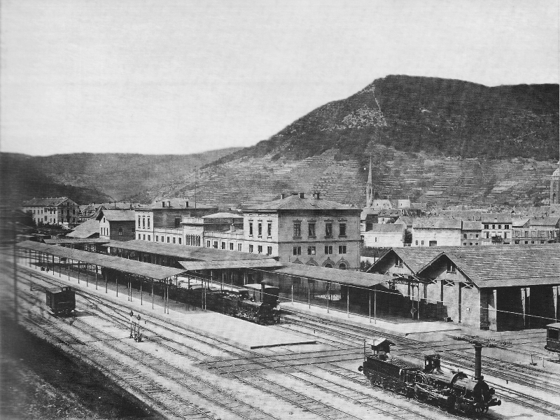 Bahnhof Neustadt ca. 1866-1869